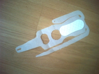 Zloženie výrobku: (polypen 97%, SPA 0,1%, buničina 2,85%, slikon 0,05%). Plienka je vyrobená z materiálu, ktorý je odolný voči presiakavosti, je dostatočne pružný a zdravotne nezávadný. Jeho mäkkosť zaručuje, že nebude spôsobovať Vášmu miláčikovi odreniny a nebude tak dochádzať k záporným reakciám. Kapsa, do ktorej sa zachytávajú tuhé exkrementy, je dimenzovaná s ohľadom na veľkosť zvieraťa. Absorbér je vhodnou kombináciou SPA a buničiny. Tento dokáže zachytiť veľké množstvo tekutiny a svojím nasiakavým jadrom ju okamžite premení na gél. Umiestnenie absorbéru je riešené tak, aby vyhovovalo na použitie pre samcov aj pre samičky. Nedoporučujeme používať absorbér viackrát, nakoľko po jeho použití obsahuje mikrobiálnu zložku moču, čo môže spôsobiť infikovanie kultivovanými baktériami.